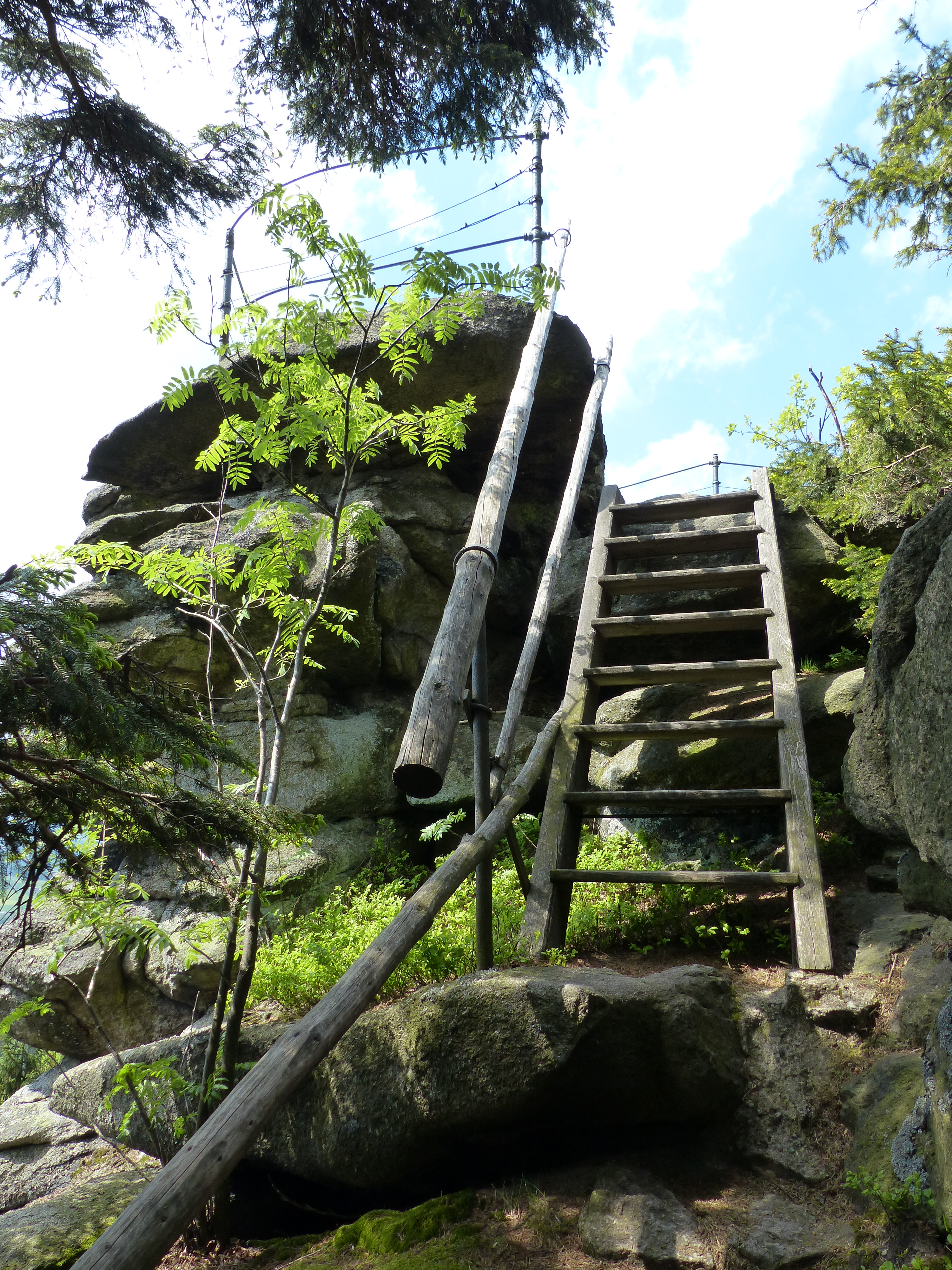 Waldstein